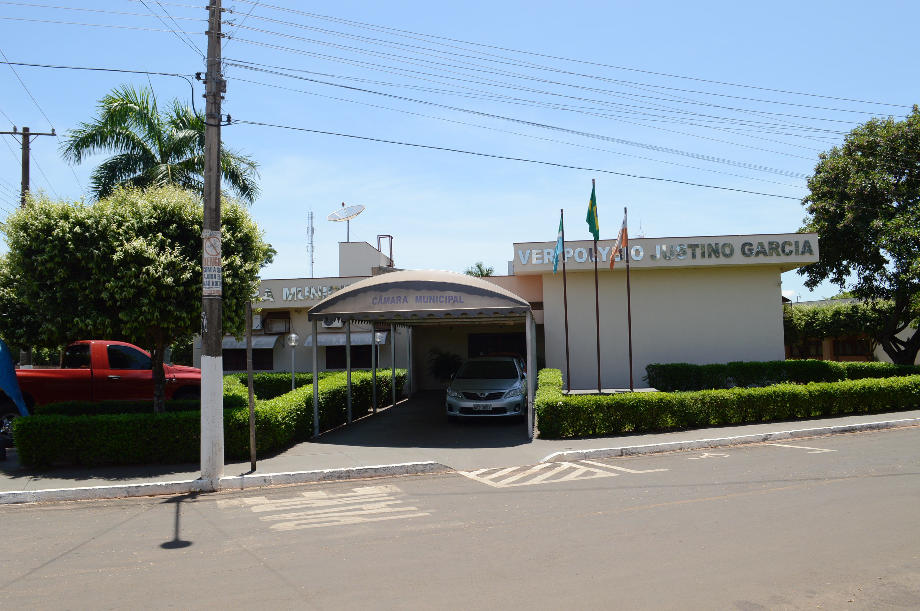 Fachada da Câmara Municipal de Aparecida do Taboado em dezembro de 2015.